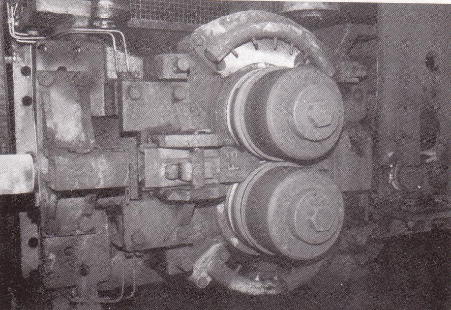 Dtalle de una caja conformadora